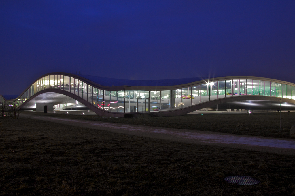 Une vue générale du bâtiment.